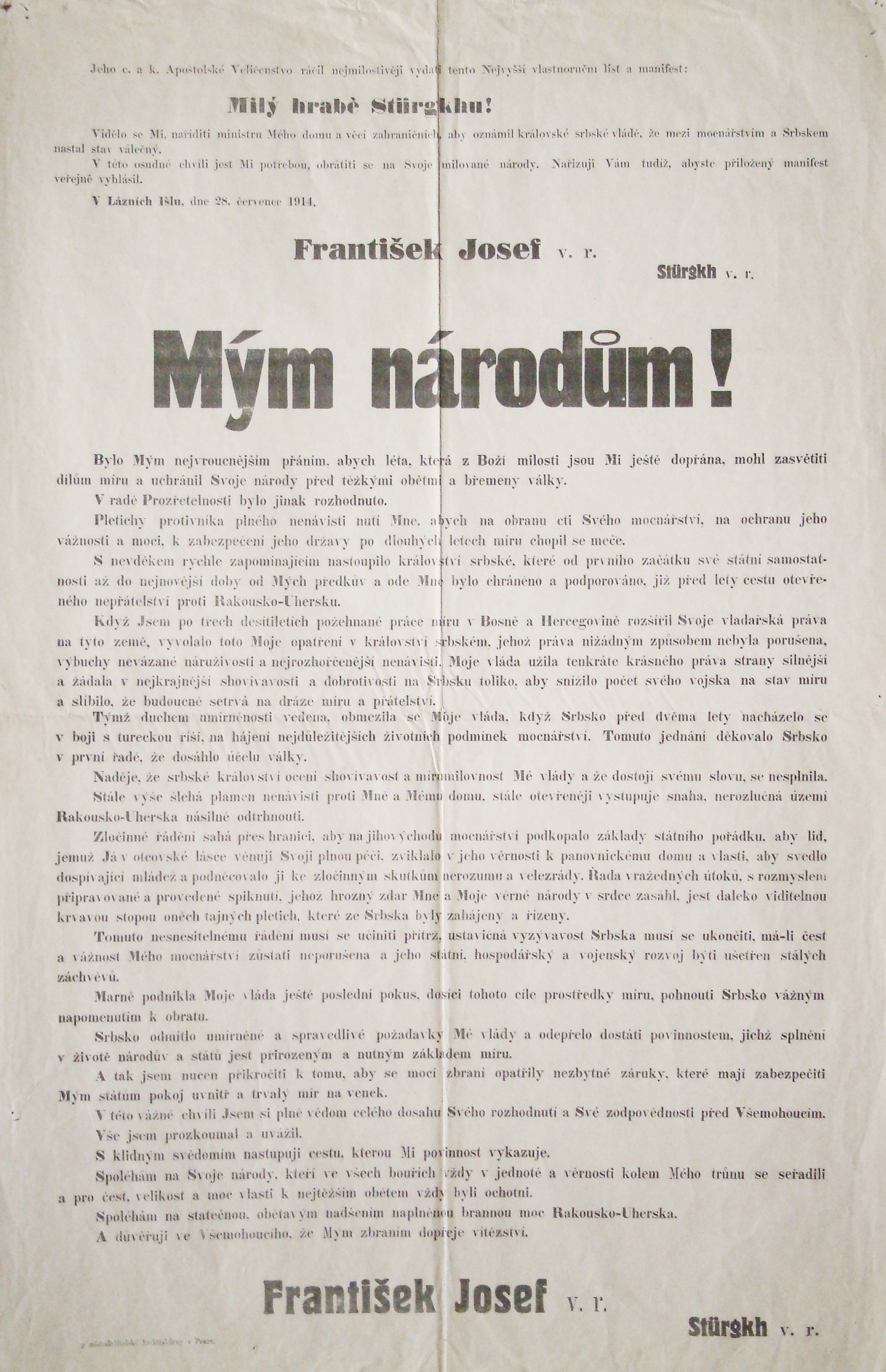 Reprodukce originálního manifestu Františka Josefa I., Mým národům, který byl proklamován zpočátku první světové války